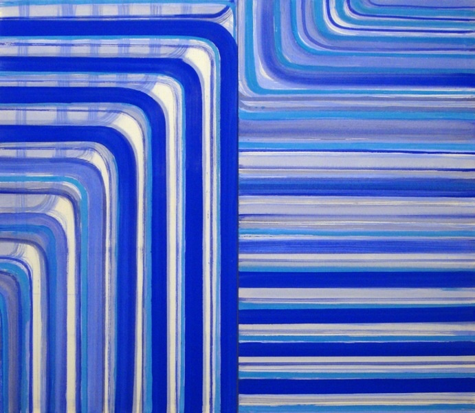 200 x 200cm